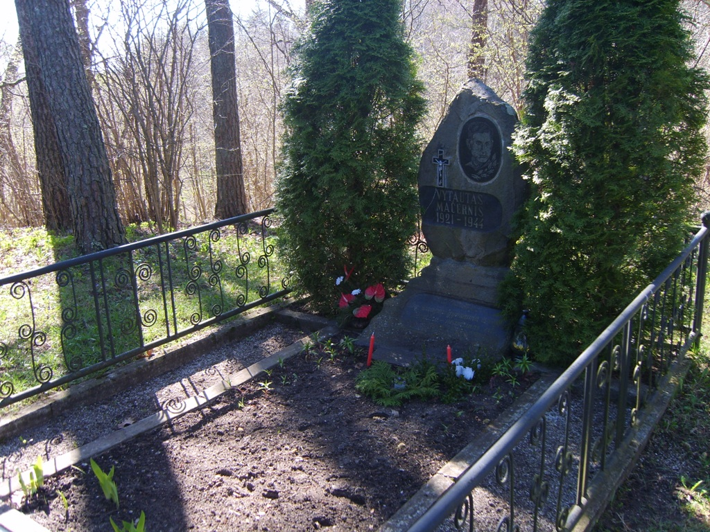 Poeto V. Mačernio kapas Šarnelėje